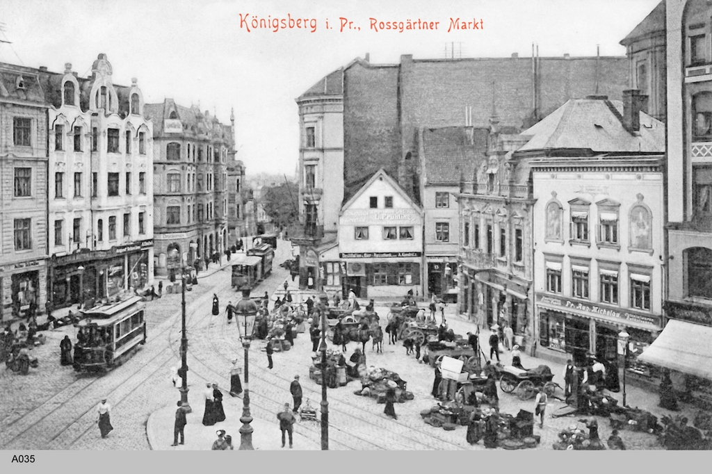 Königsberg